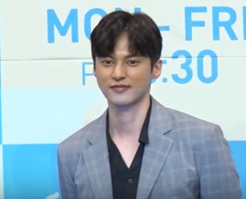 KBS 1TV 일일연속극 '여름아 부탁해' 제작발표회가 25일 오후 라마다 서울 신도림 그랜드볼룸에서 열렸다.